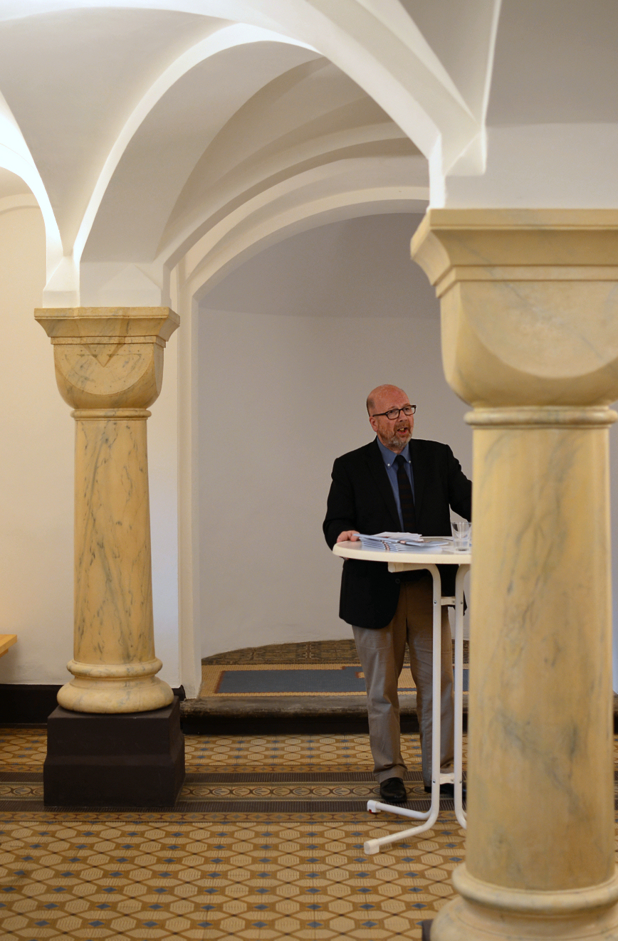 Frühere Krankenhauskapelle im früheren Vinzenzstift in Hannover, heute Niedersächsisches Landesamt für Denkmalpflege, Veranstaltungseröffnung durch den Präsidenten Stefan Winghart